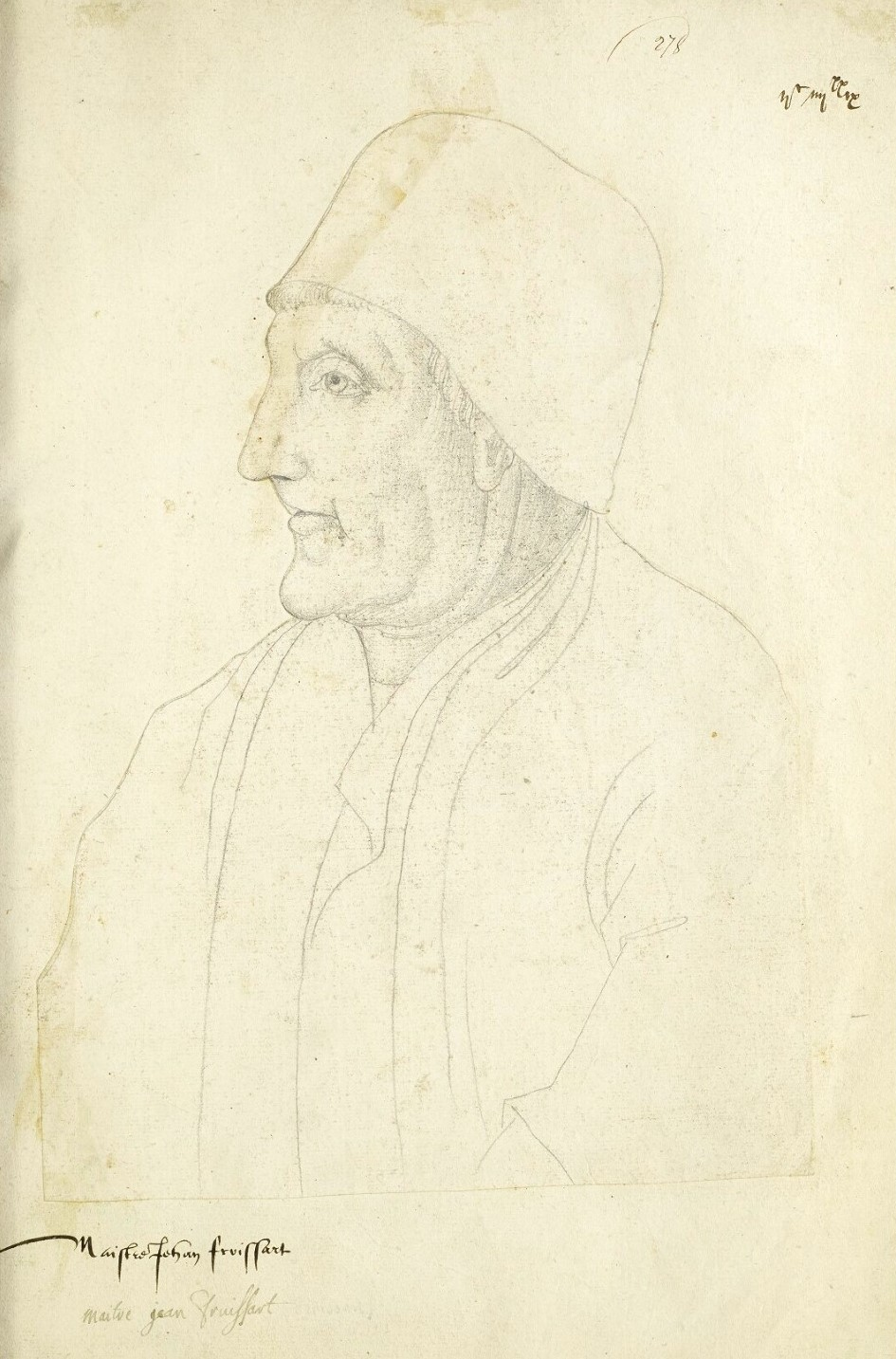 Portrait à la sanguine de Jean Froissart dans le Recueil d'Arras (Bibliothèque municipale d'Arras).